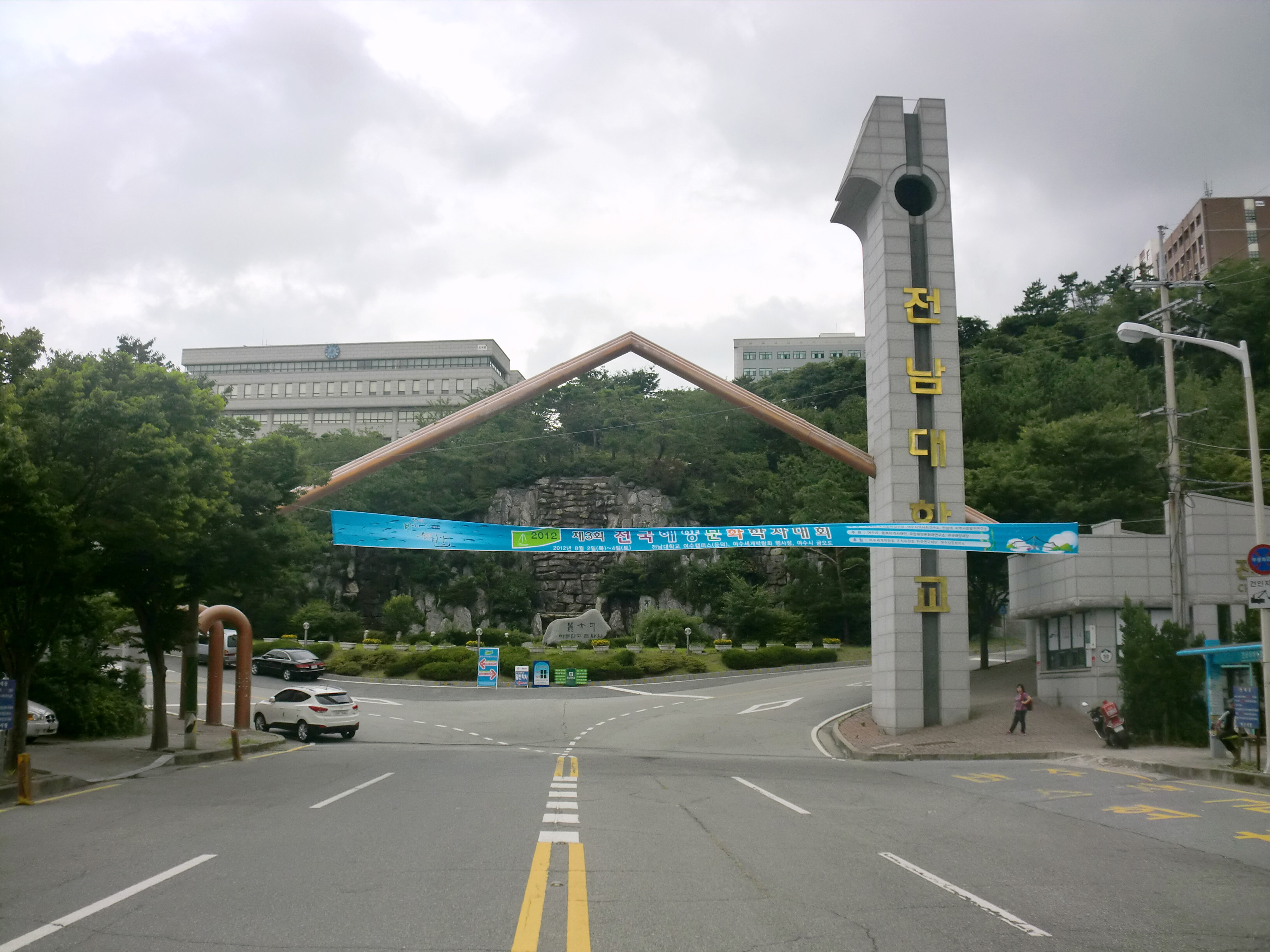 전라남도 여수시에 있는 전남대학교 둔덕캠퍼스 정문